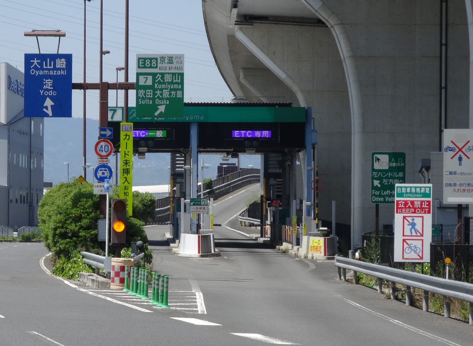 久御山インターチェンジ料金所